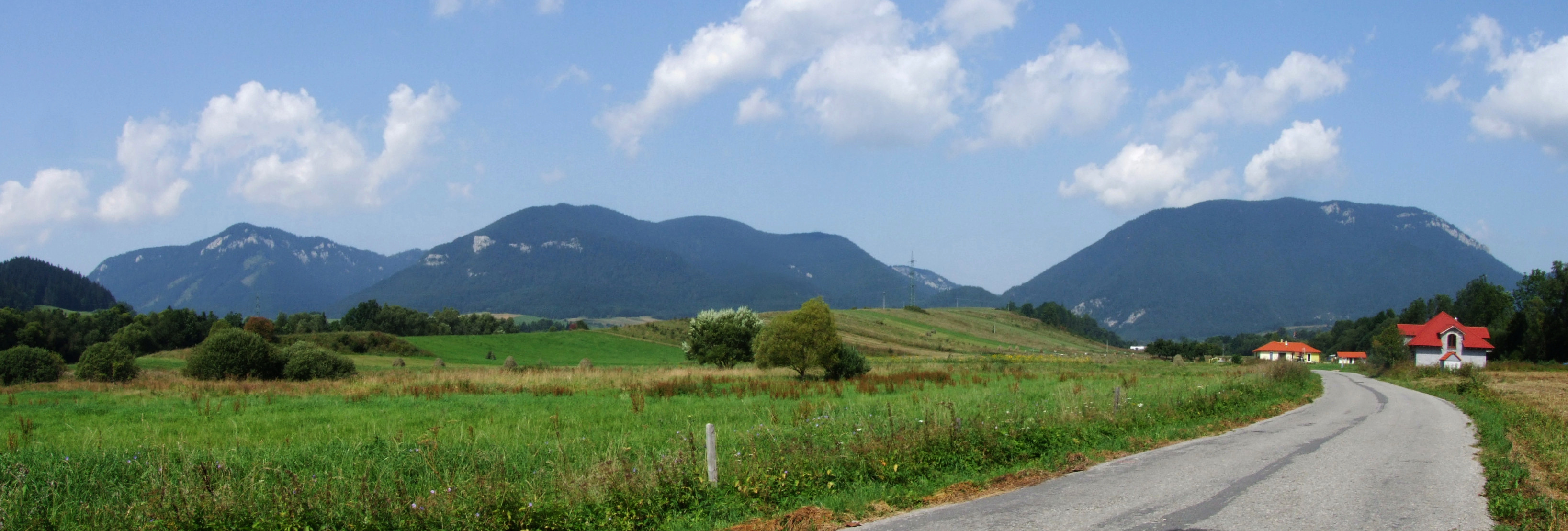 Góry Choczańskie (Grupa Prosiecznego). Widok z Prosieka